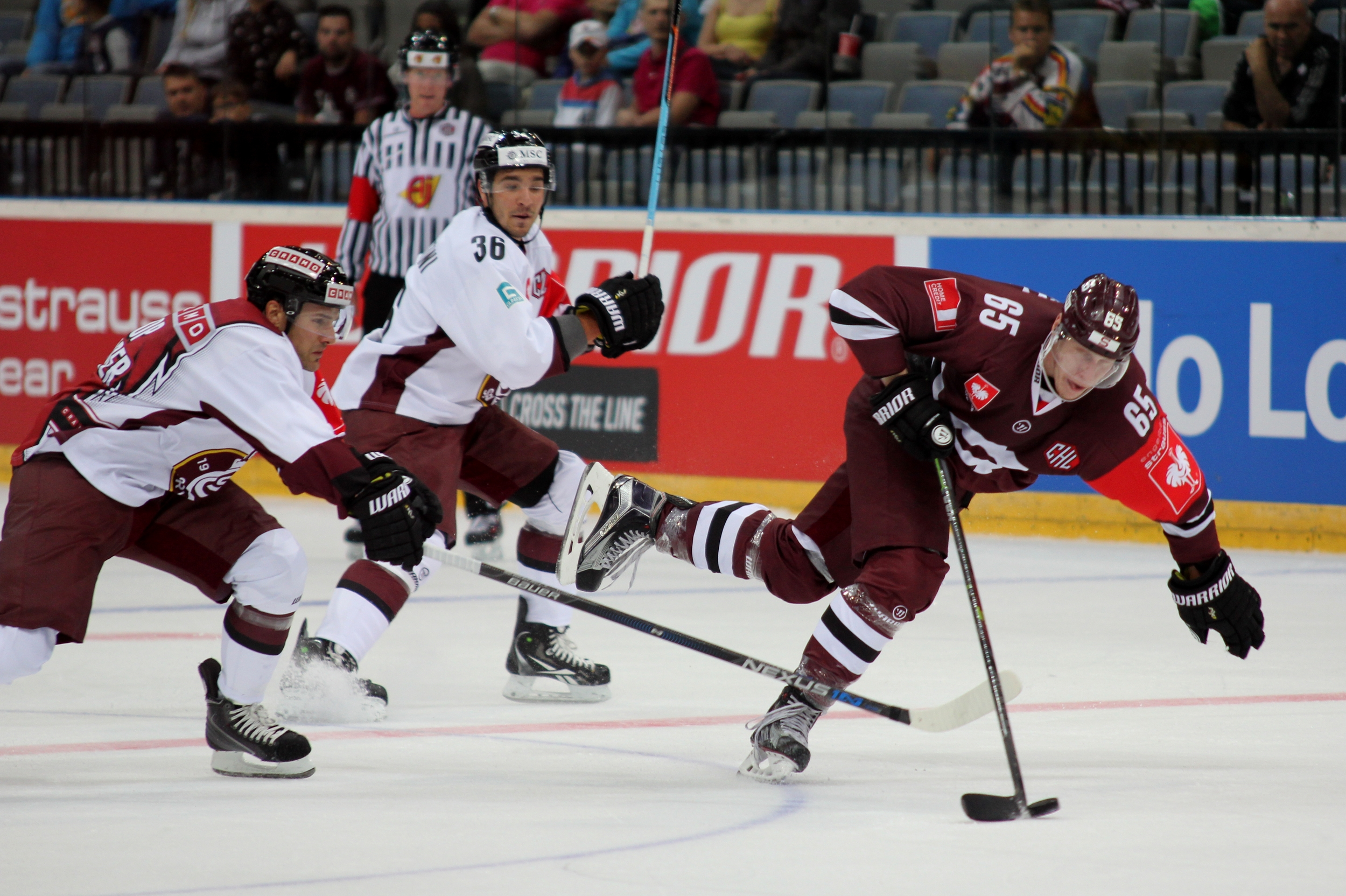 Matthew Lombardi (G 10, CTS), Matt D'Agostini (G 36), Michal Cajkovský (P 65).